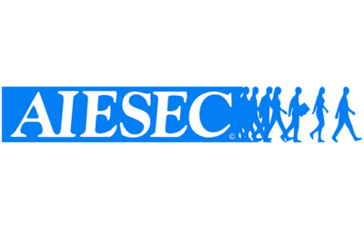 logo